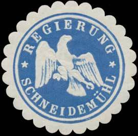 Sealing stamp Title: Regierung Schneidemühl Description: blau, weiß, geprägt Place: Schneidemühl size: 4 cm